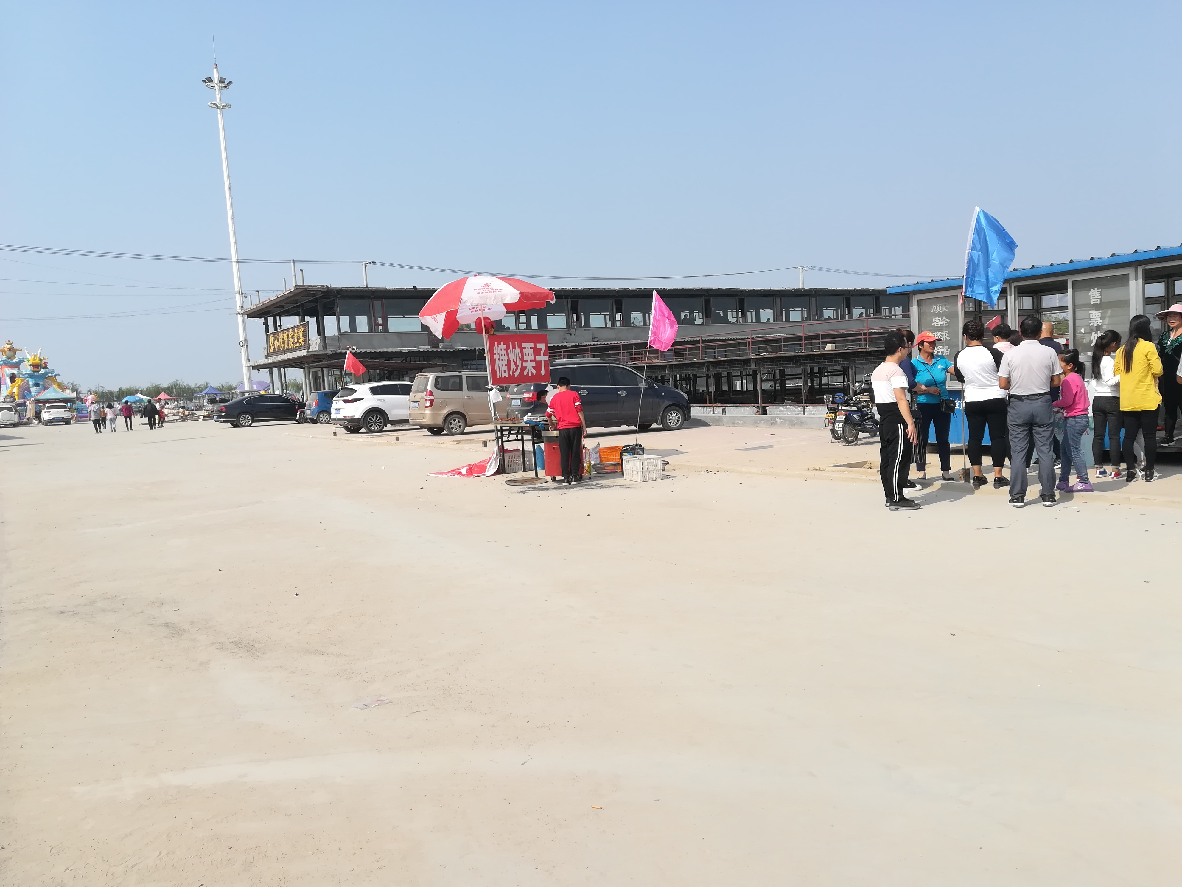 中文（中国大陆）: 大安山古镇码头